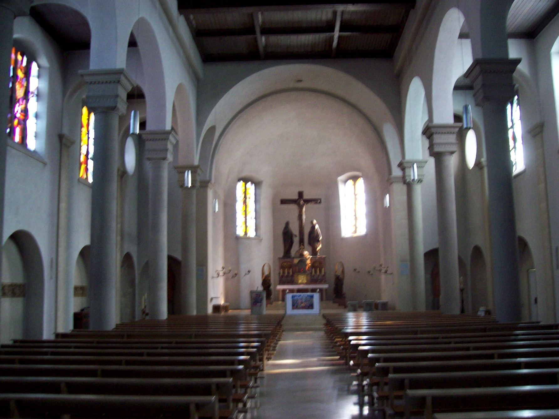 St. Laurentius Aschaffenburg Leider - Innenansicht 2011